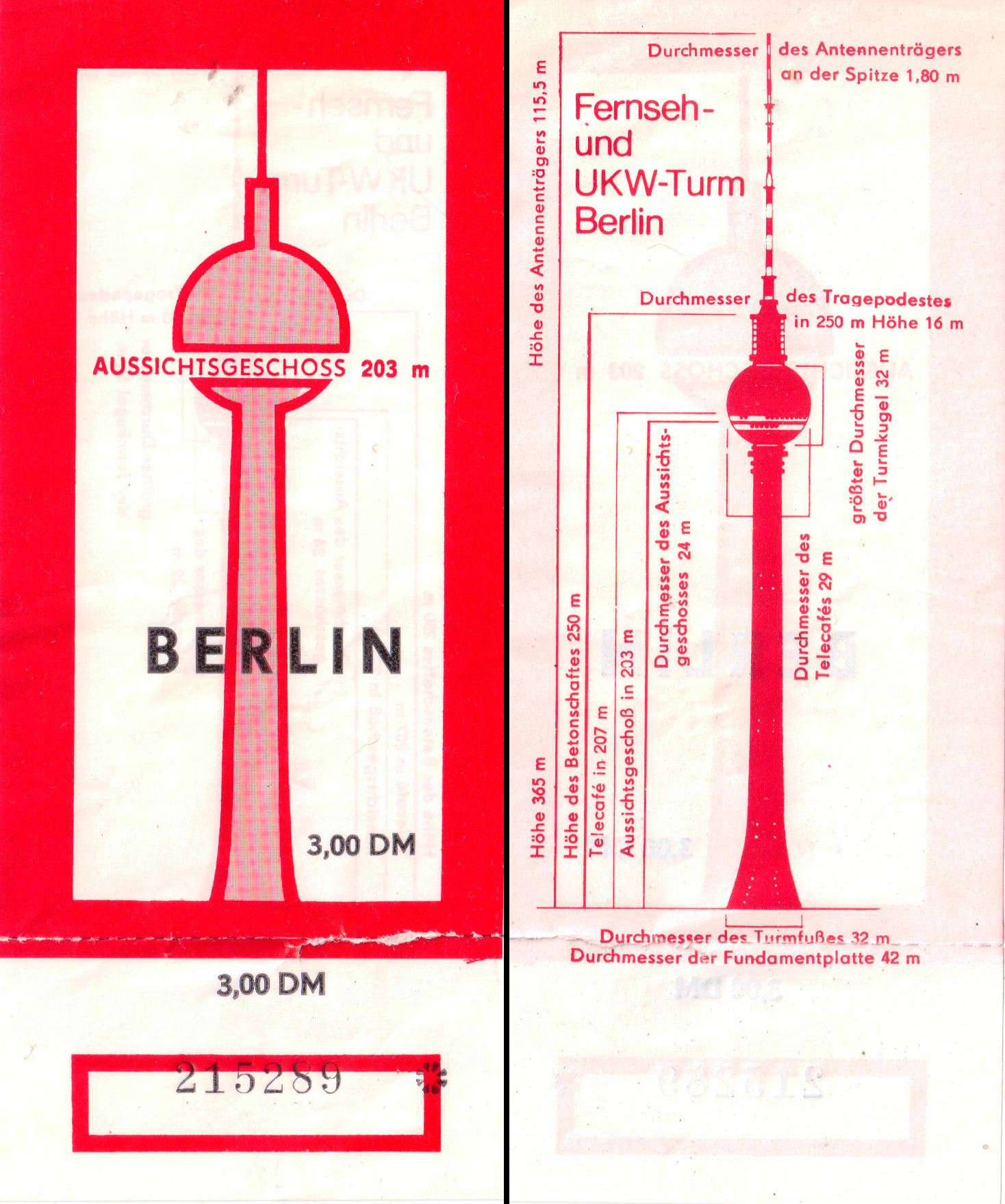 Depuis ce premier étage, un second ticket de 5 DM donnait droit à passer au second par des escaliers, 4 mètres plus haut.